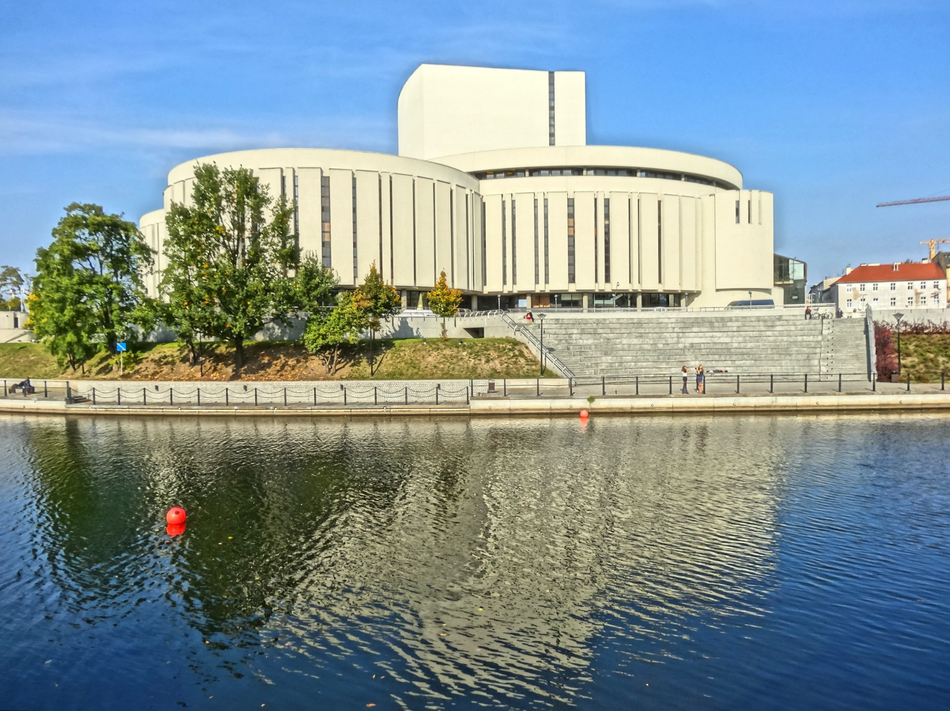 Budynek Opery Nova, zbud. w latach 1973-2006 w Bydgoszczy, ul. Ferdynanda Focha 5